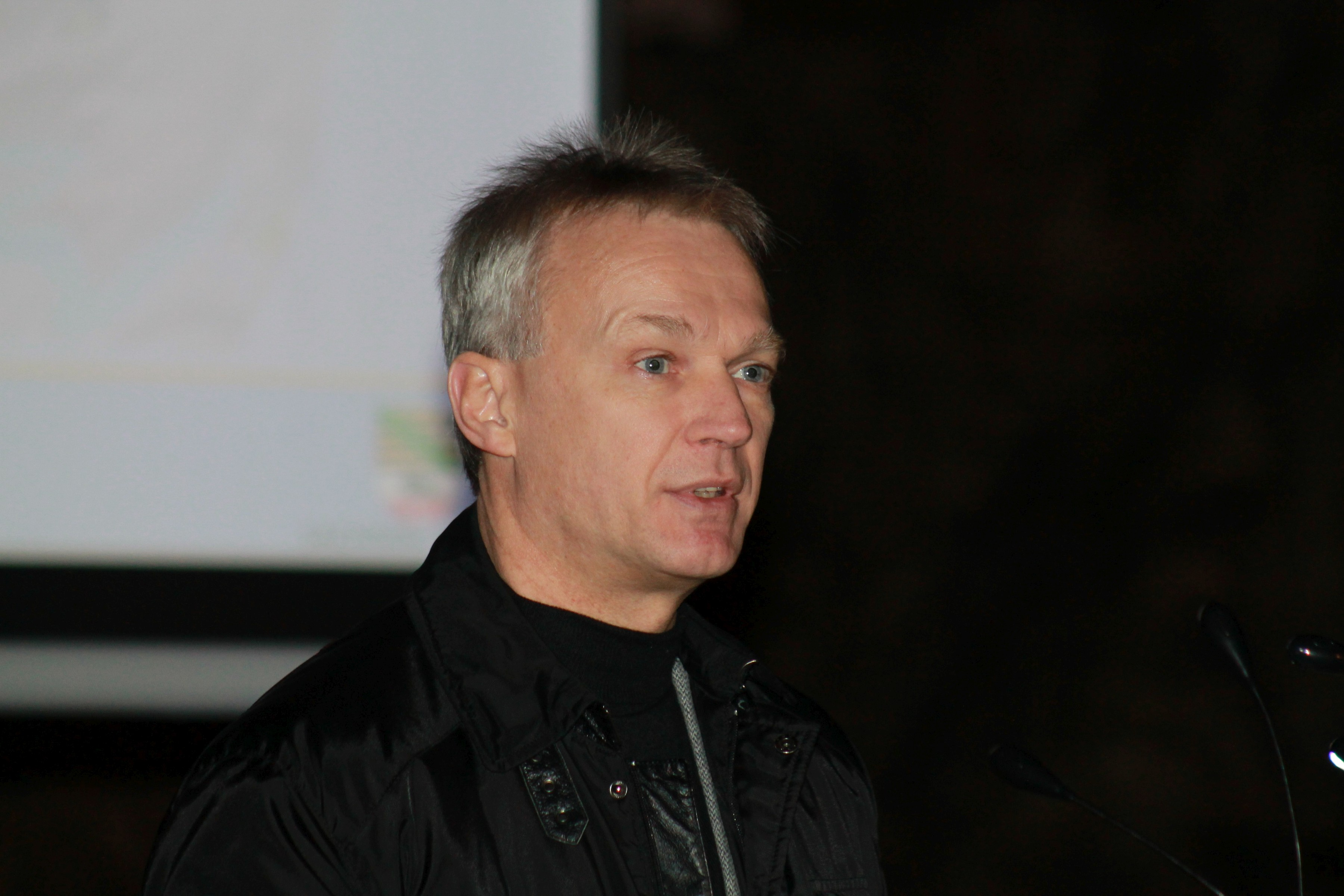 Kurt Schnieber, Präsident des Landesamtes für Geologie und Bergwesen (LAGB) Sachsen-Anhalt. Veranstaltung "Neue Harzliteratur" am 24. Januar 2015 in der Baumannshöhle, Rübeland, Sachsen-Anhalt, Deutschland.